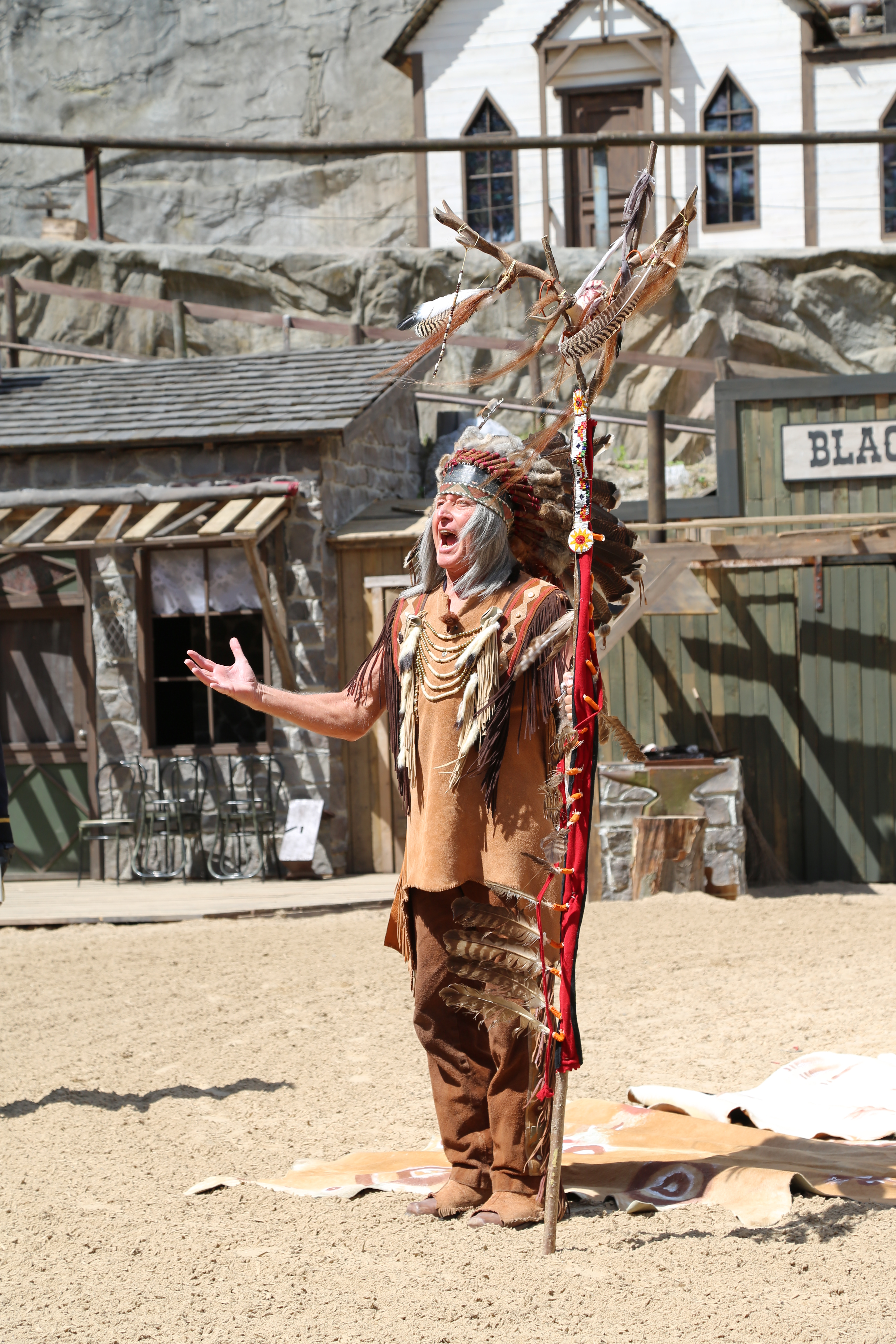 Harald Wieczorek präsentiert eine Szene bei der Pressekonferenz am 16.06.2017, im Freilichttheater am Kalkberg in Bad Segeberg.